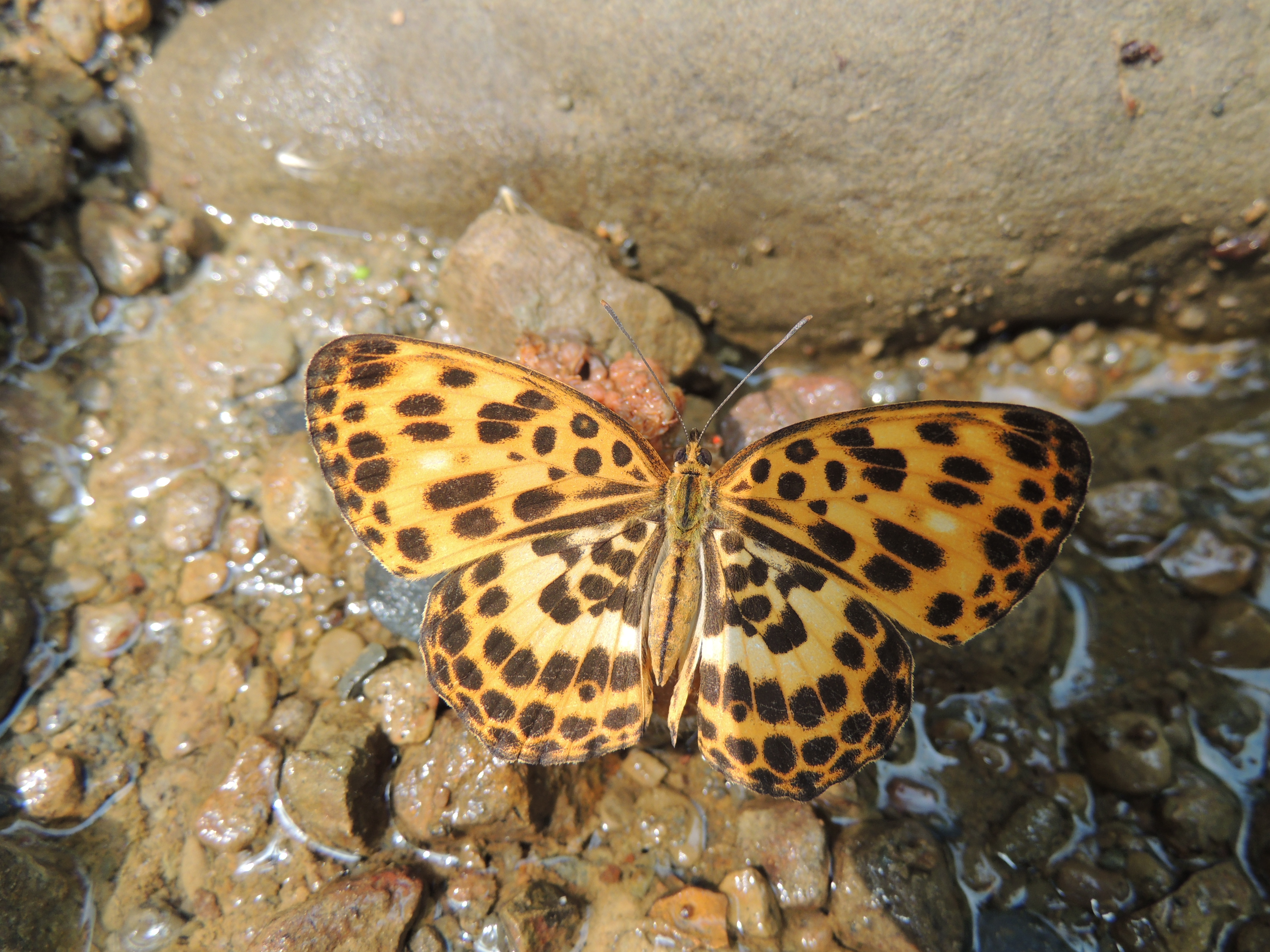 359豹紋蝶2(劉威良攝)